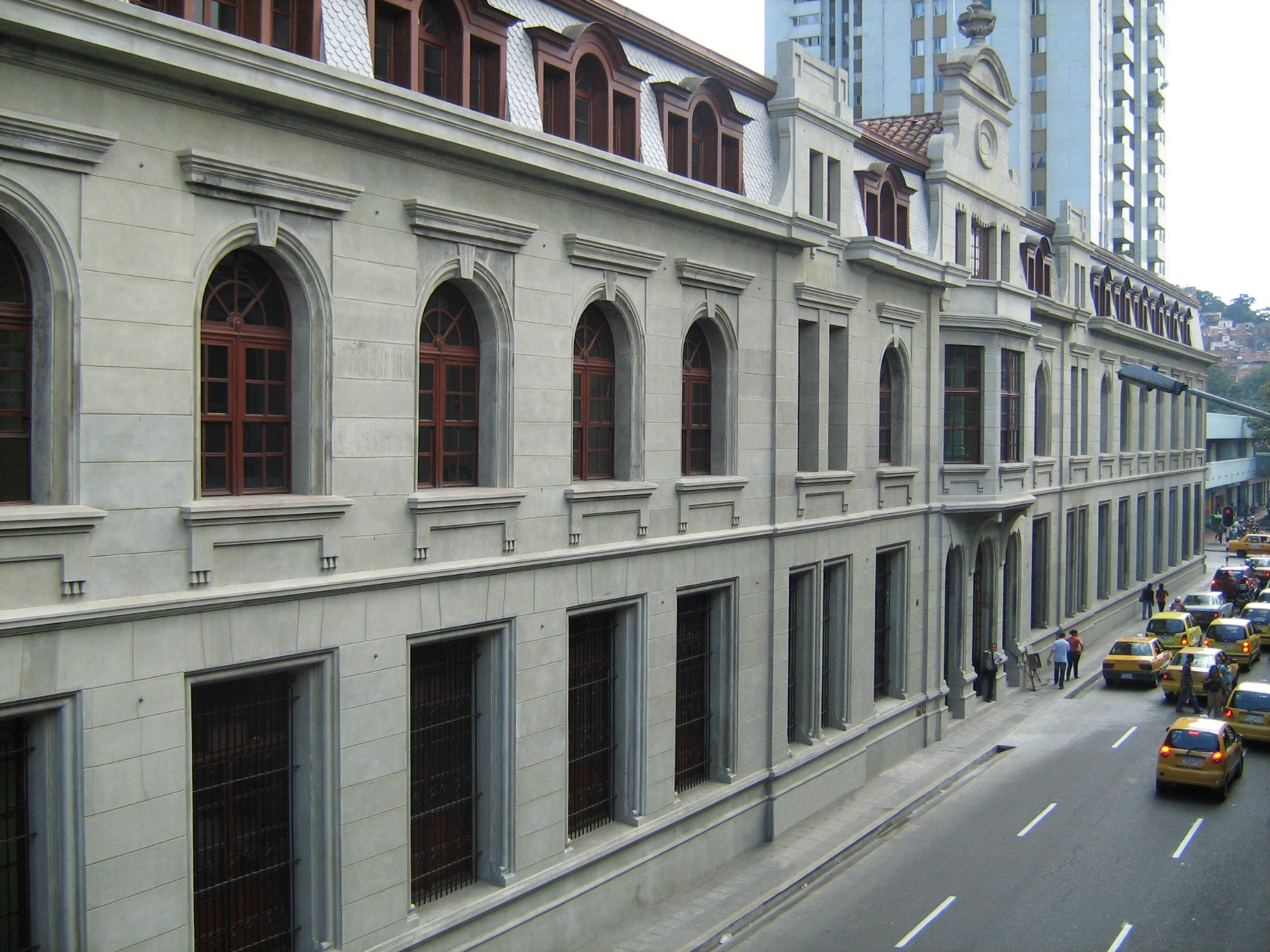 Edificio de la antigua Escuela de Derecho, diseñado por el arquitecto belga Agustín Goovaerts. Medellín, Colombia